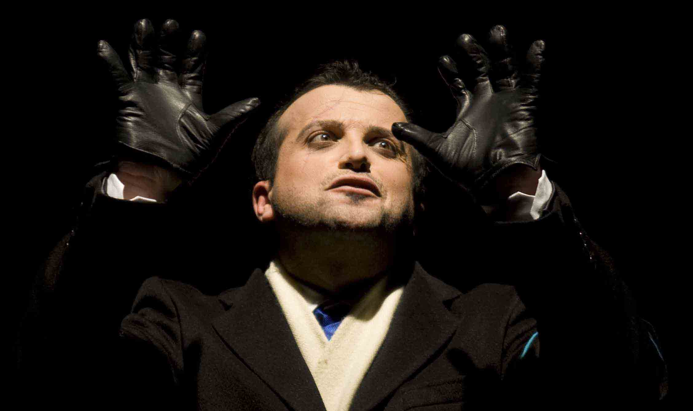 Jorge Moreno en la obra "Asturiestein" (2009).